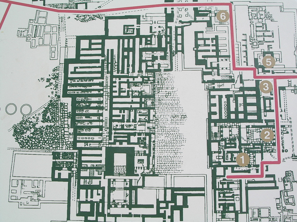 Plan du palais de Cnossos